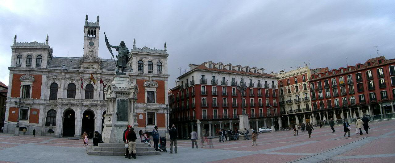 Vista panorámica de la plaza Mayor de Valladolid. La estatua del Conde Ansúrez dando la espalda al Ayuntamiento domina la escena